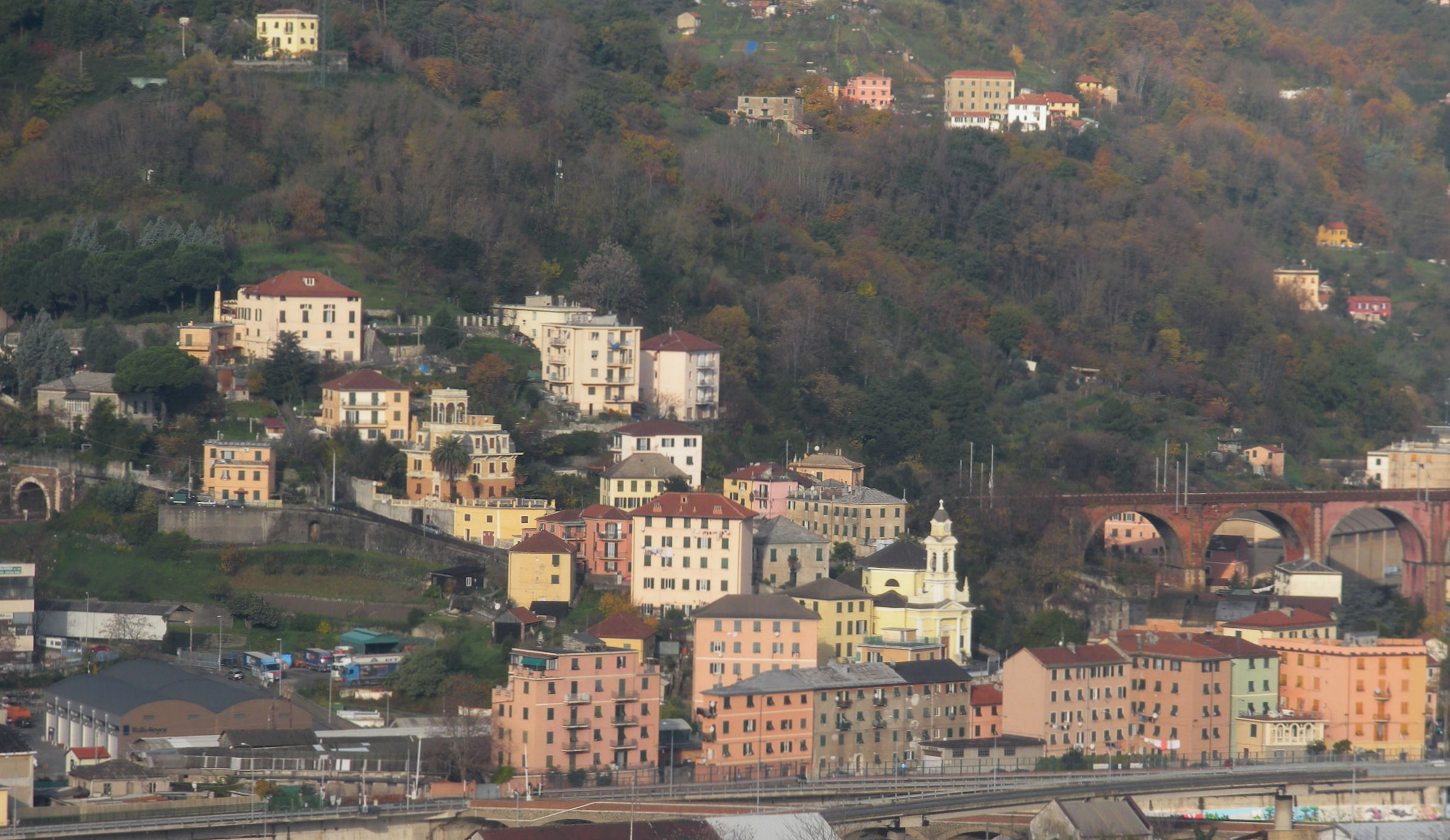 Veduta di Trasta (Quartiere di Rivarolo, comune di Genova)